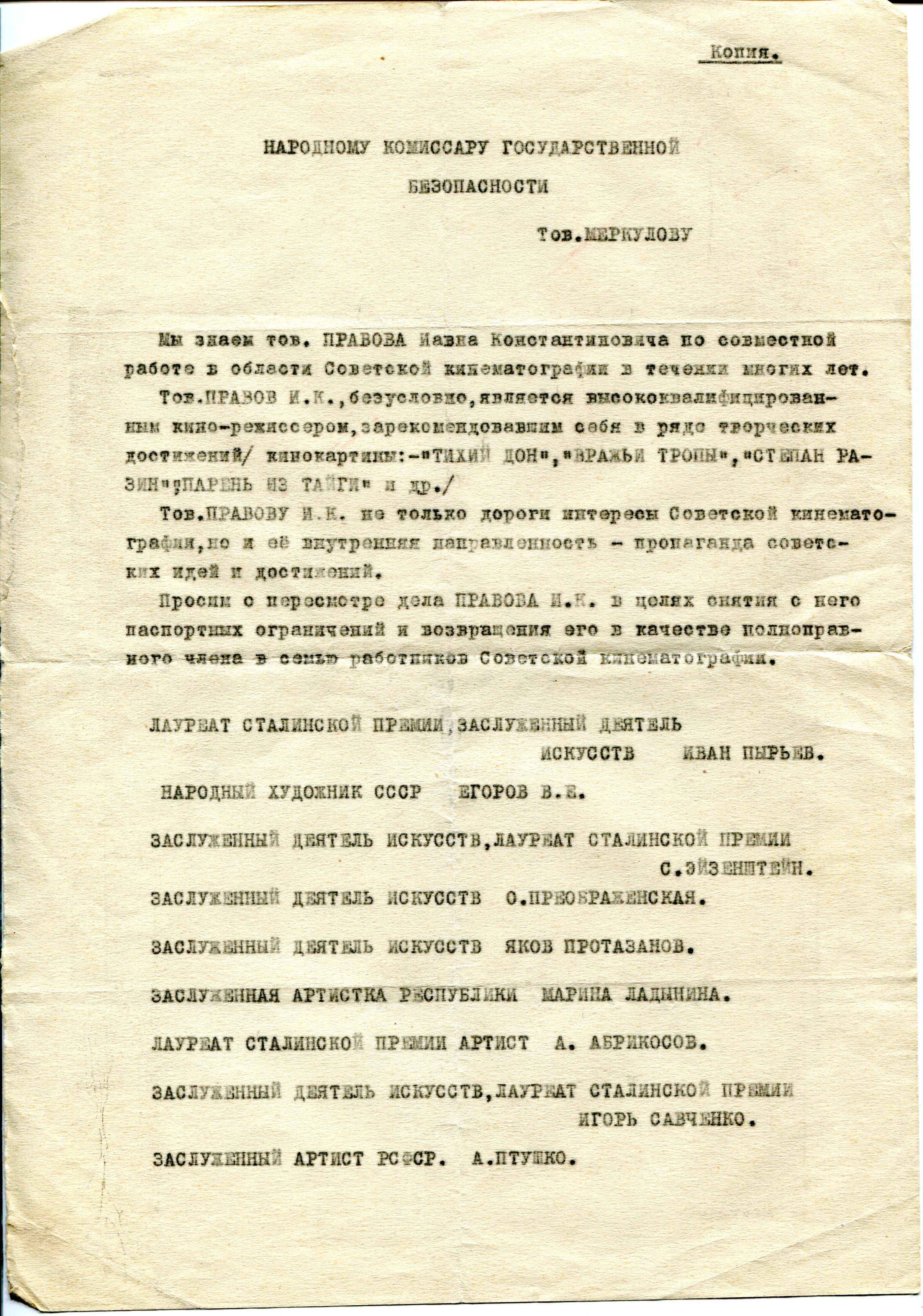 Обращение деятелей искусства о пересмотре дела Правова